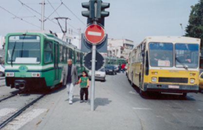 Transports publics à Tunis